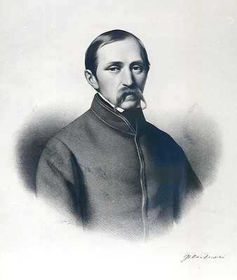 Беларуская (тарашкевіца): Партрэт Язэпа Ігнацыя Крашэўскага